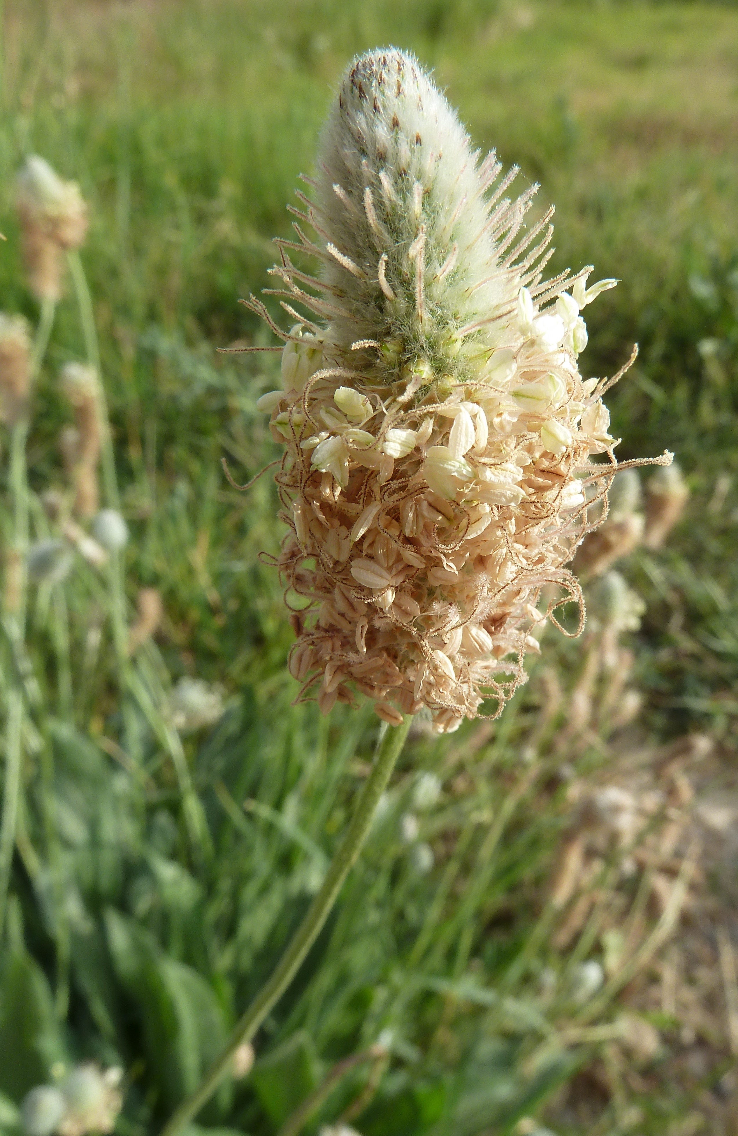 Plantago lagopus (Pie de Liebre) : Inflorescencia - La Huerta, Albatera (Alicante, España).